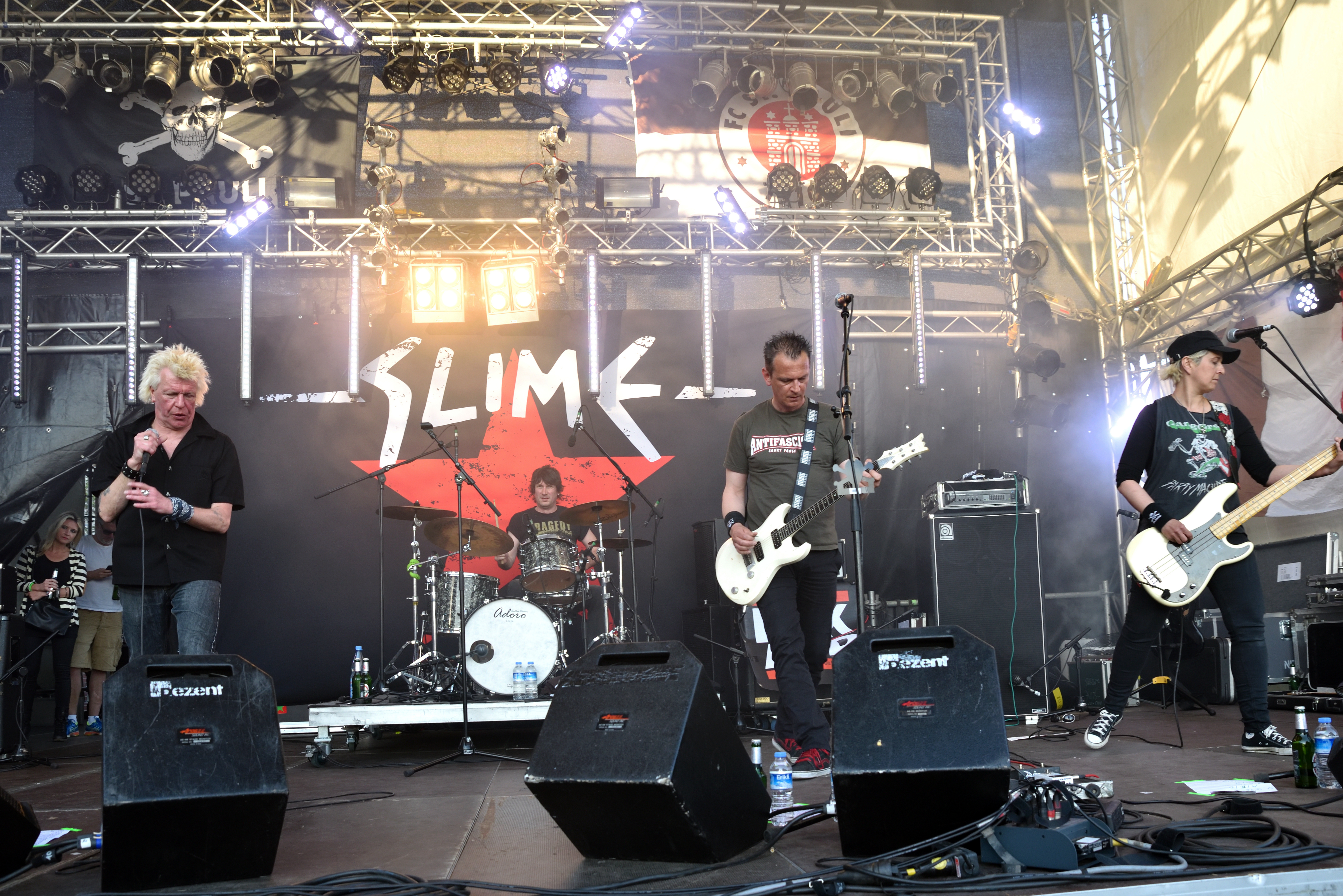 Slime beim Hafen Rock 2016 in Hamburg